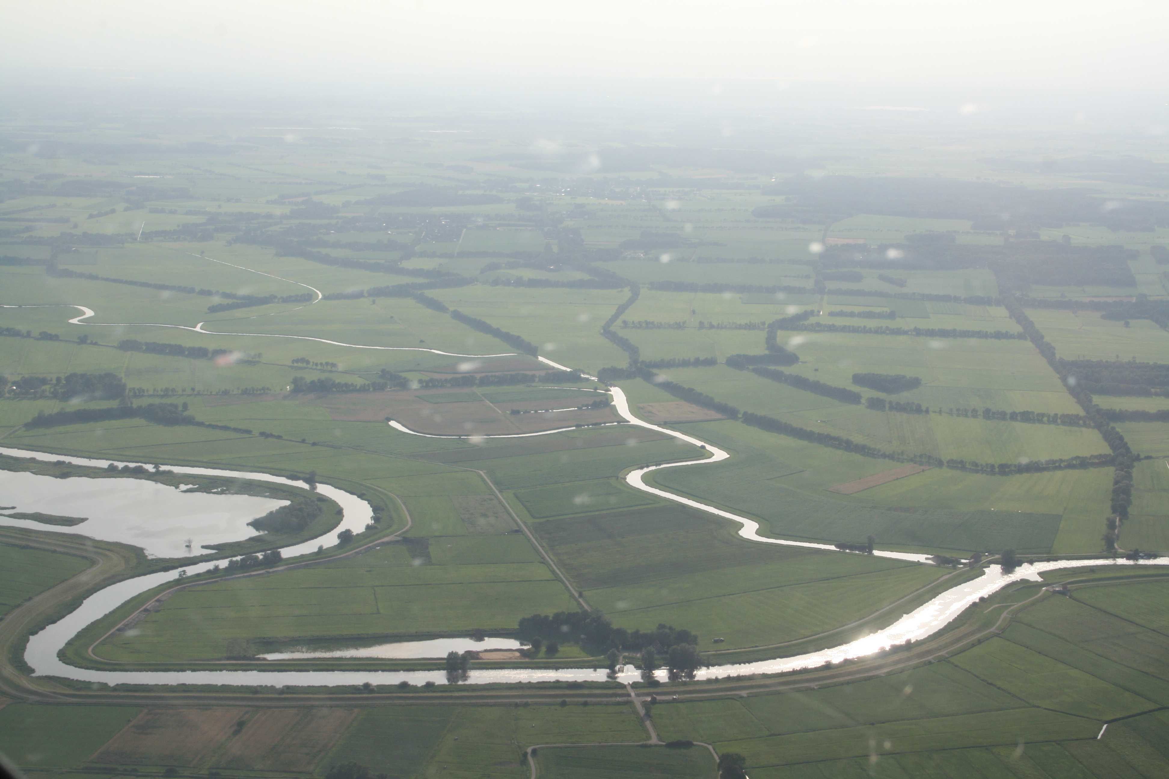 Mehe